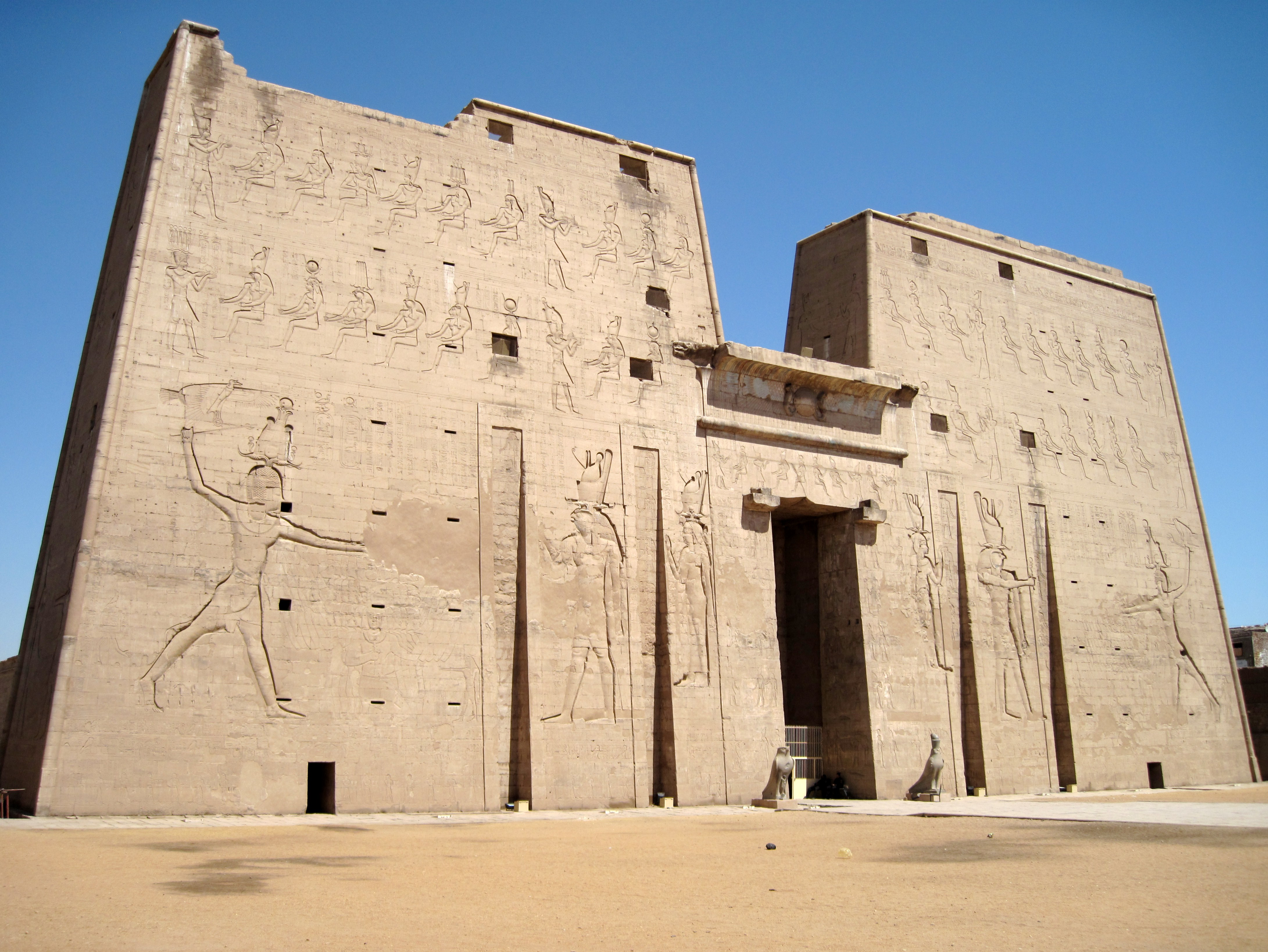 Pylon des Tempels von Edfu, Ägypten